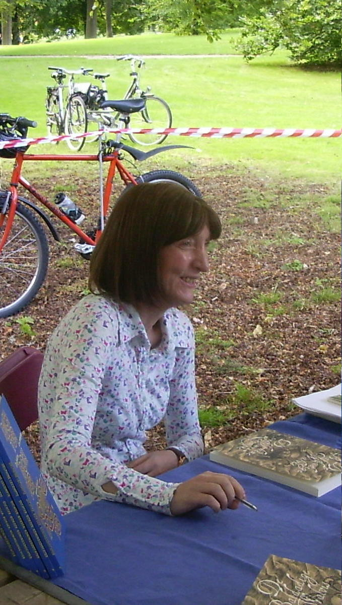 Delphine Lecompte signeert op het festival Het park vertelt in Park Hartenstein in Oosterbeek